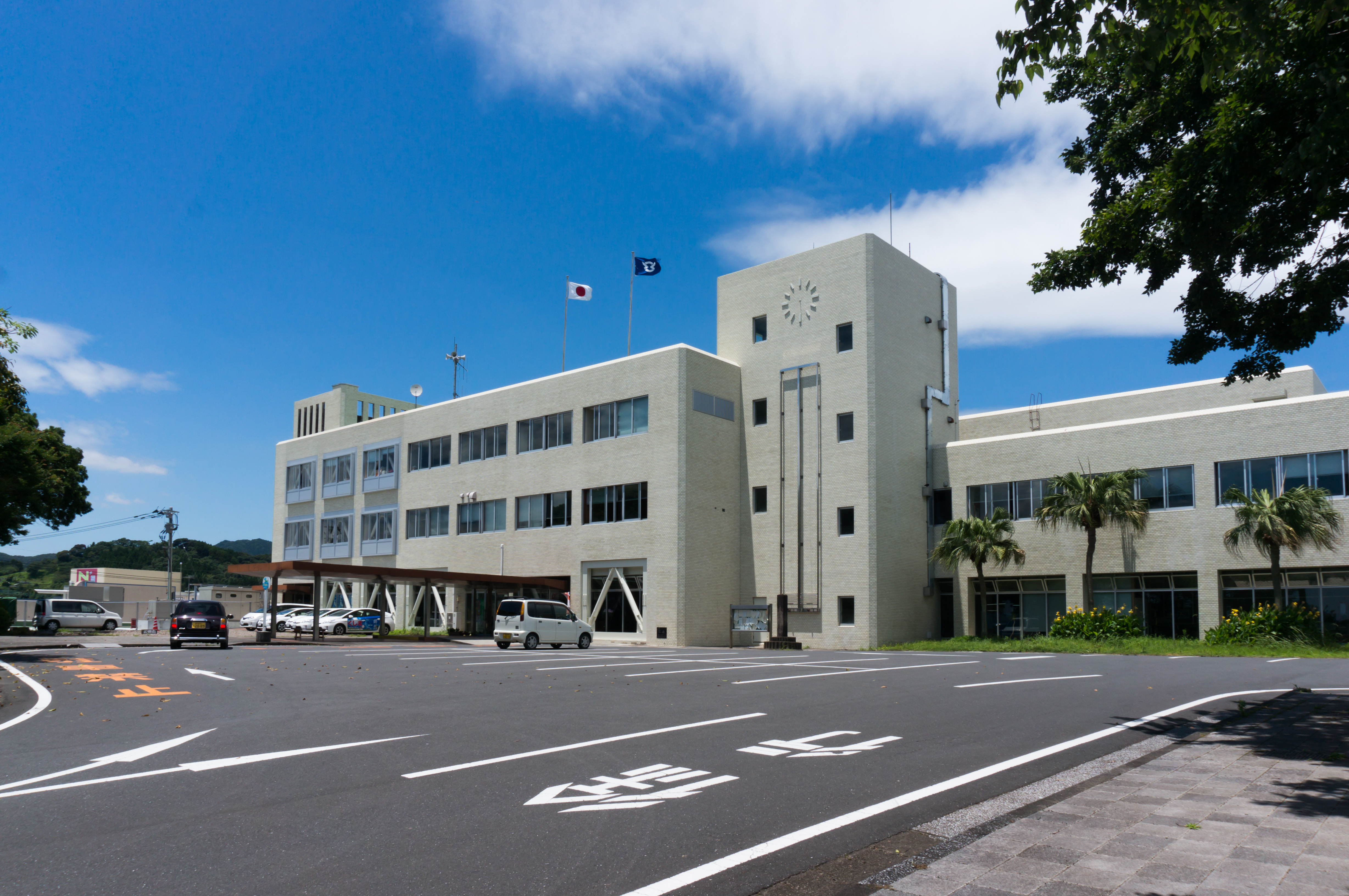 串間市役所。2014年度耐震化工事完了後に撮影。